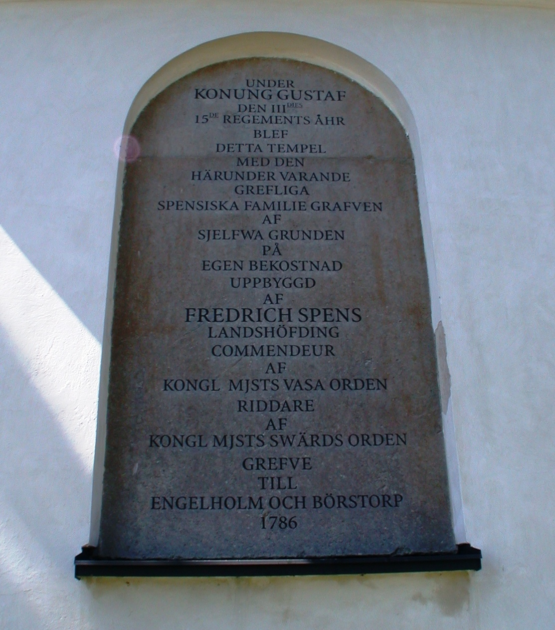 Enåsa church, Mariestad, Sweden